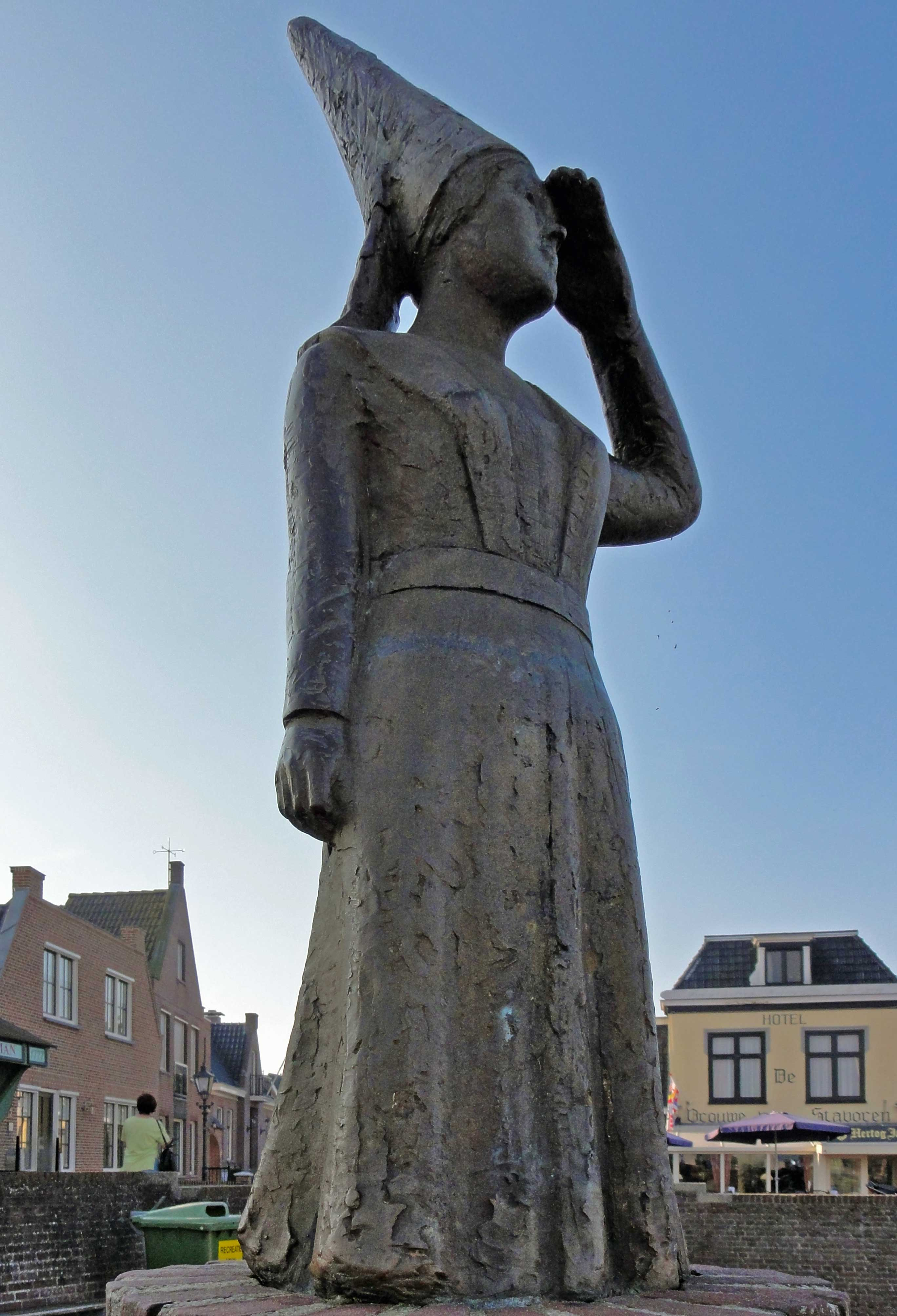 "Vrouwtje van Stavoren" door Pier Arjen de Groot in Stavoren